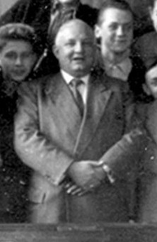 Dr. Walter Klassenfoto